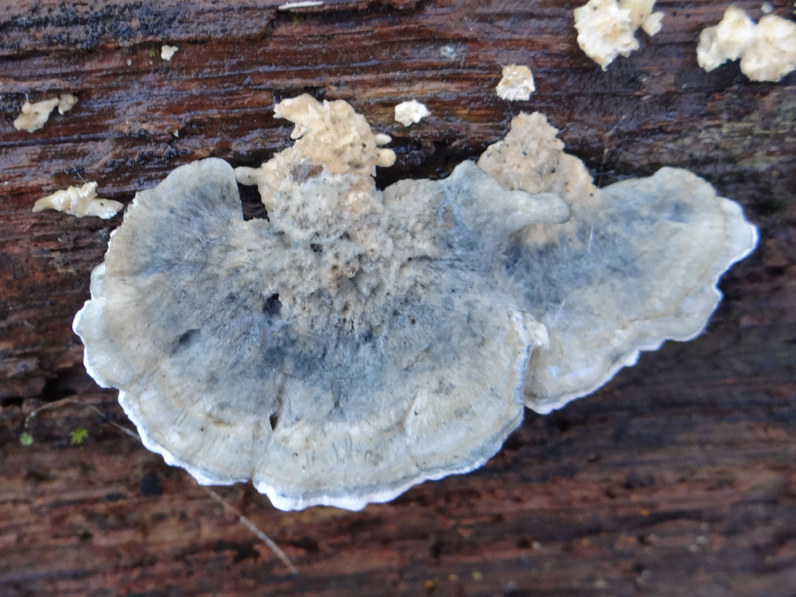 Postia subcaesia on Quercus. Location: Poland, Puszcza Niepołomicka, rezerwat przyrody 'Dębina